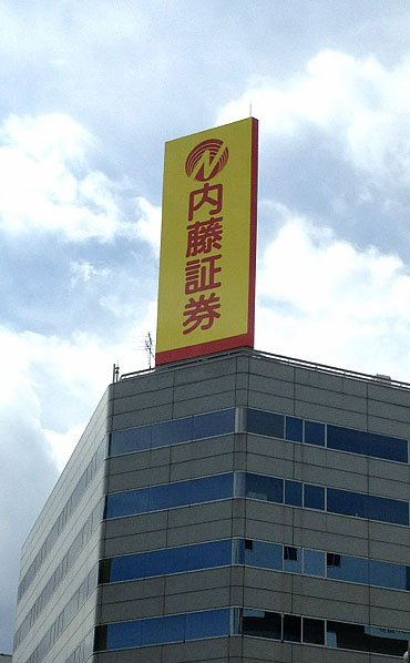 内藤証券 東京店（中央区日本橋兜町）